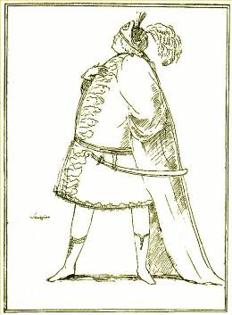 Il cantante barocco d'opera Francesco Bernardi, detto Senesino. Caricatura di Antonio Maria Zanetti.